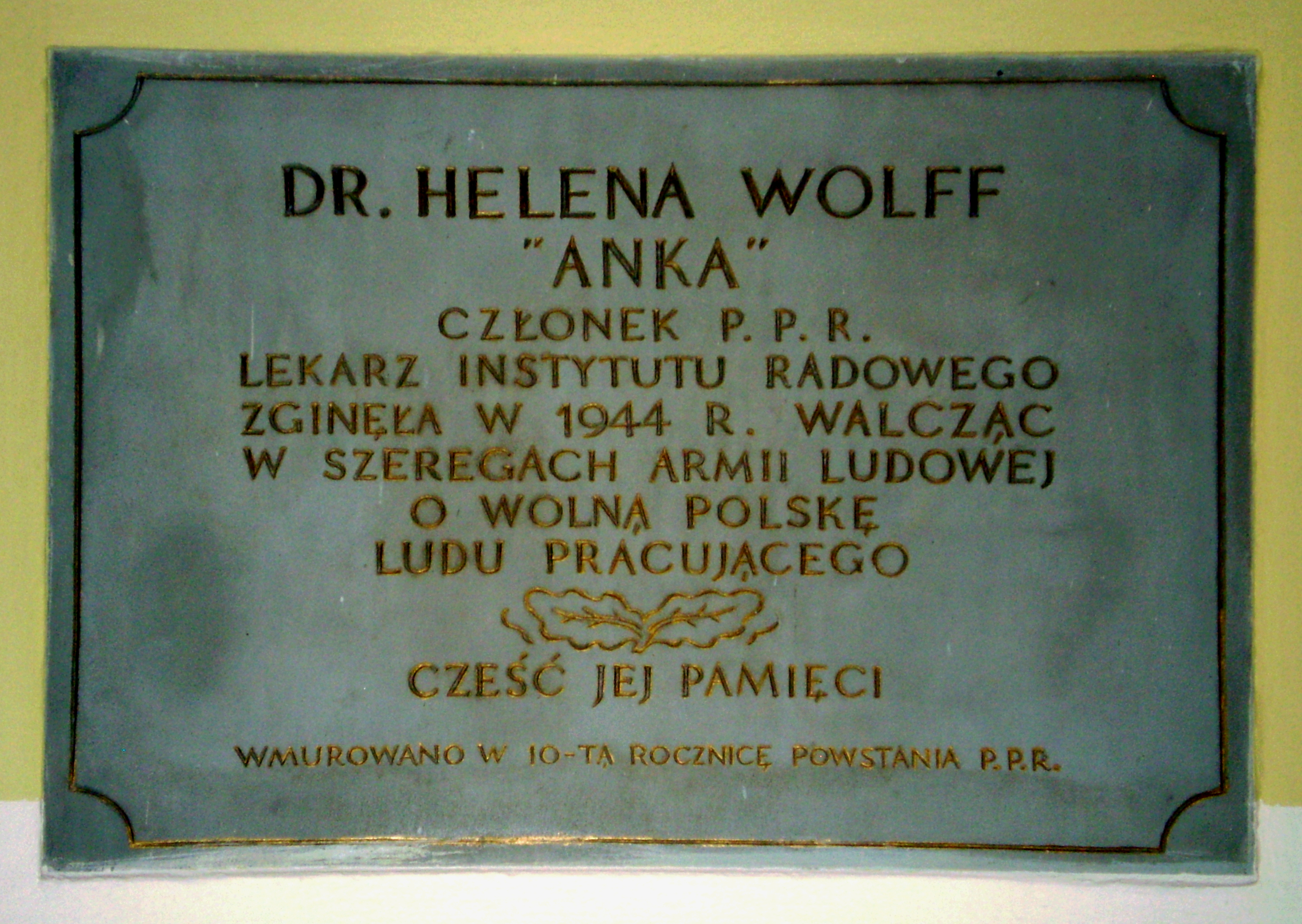 Ścieżka edukacyjna Marii Skłodowskiej-Curie w parku jej imienia w Warszawie. Stacja czwarta dawny Instytut Radowy. Tablica pamiątkowa w Klinice Onkologicznej (dawny Instytut Radowy